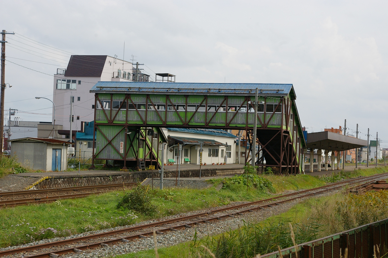 Across railroad bridge, Minami-Wakkanai station, JR Hokkaido.